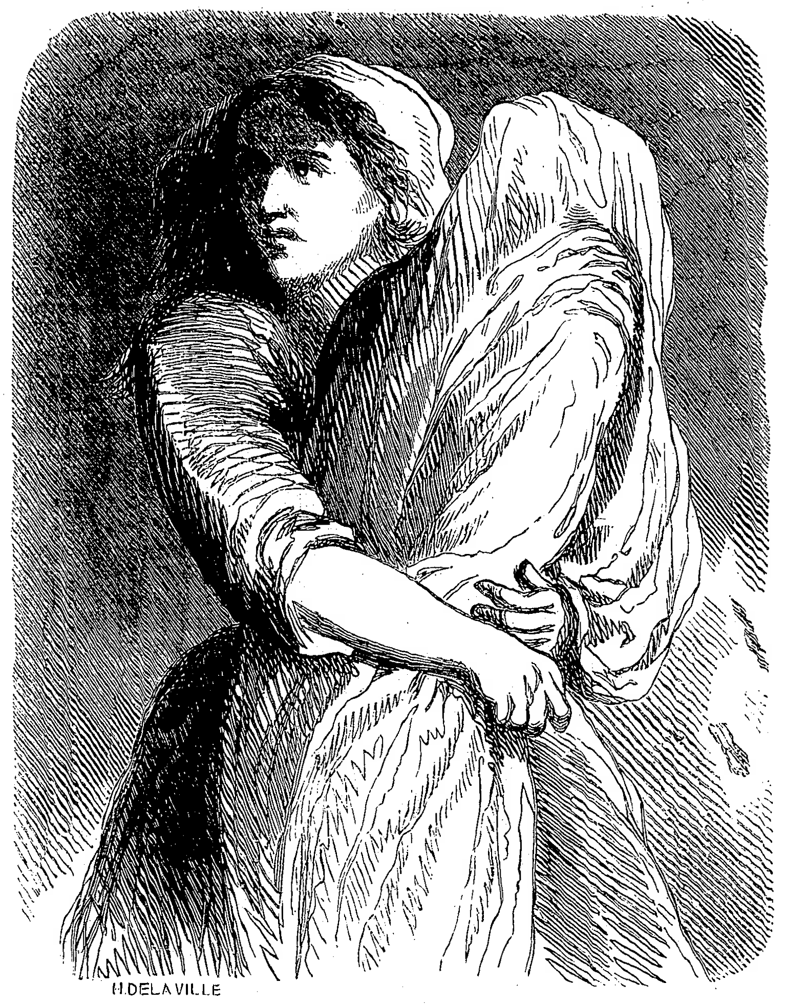 Jeanne soustrait aux flammes le corps de sa mère. Dessin en noir et blanc de Tony Johannot (gravure de A. Delaville) pour les Œuvres illustrées de George Sand, Jeanne, Paris, Jules Hetzel éditeur, volume 3, 1853.